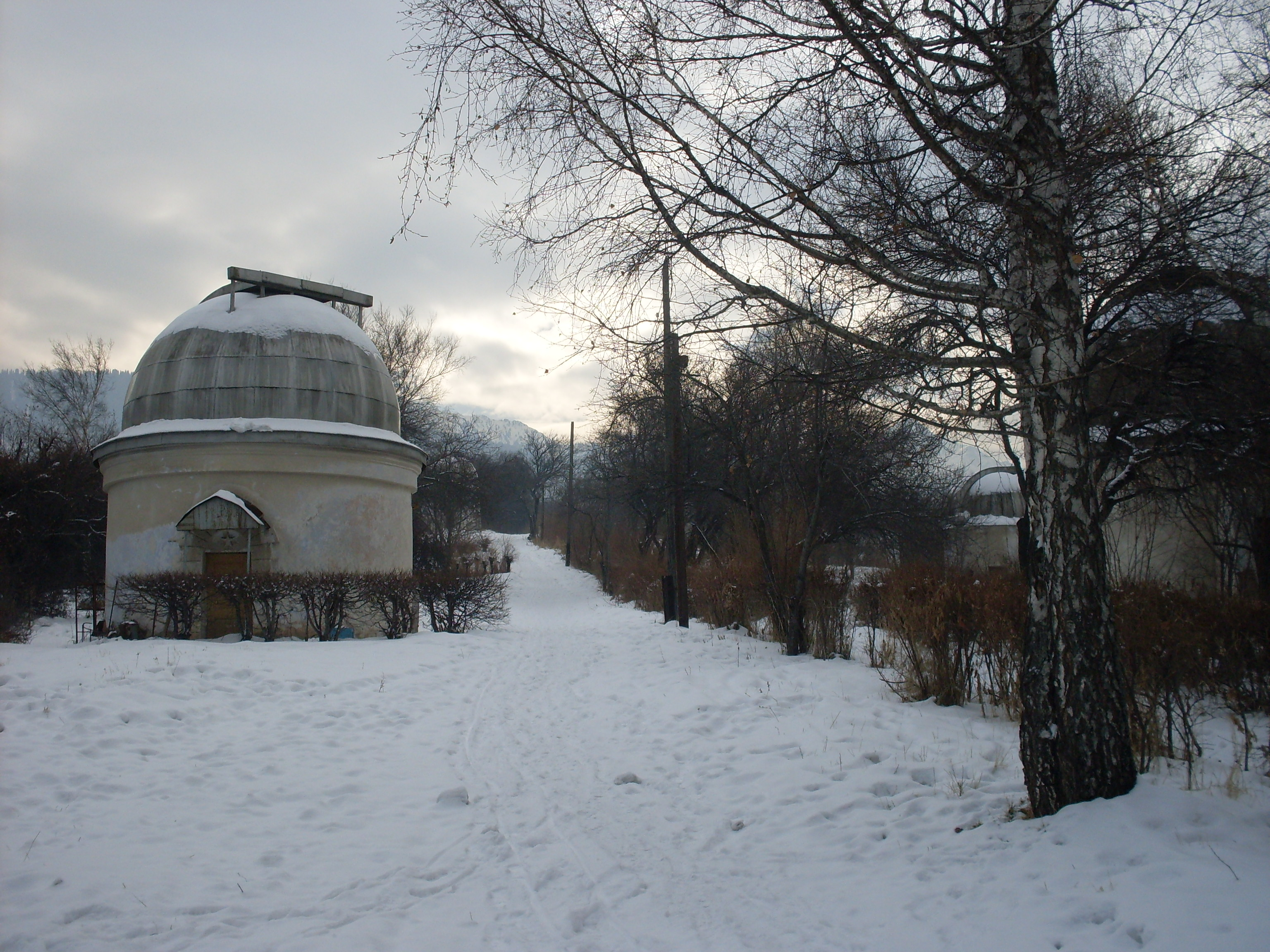 Обсерватория Астрофизического института им.Фесенкова, Алматы, Каменское плато, Казахстан